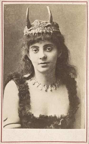 Gabriela Zapolska w roli Chochlika w "Balladynie" Juliusza Słowackiego